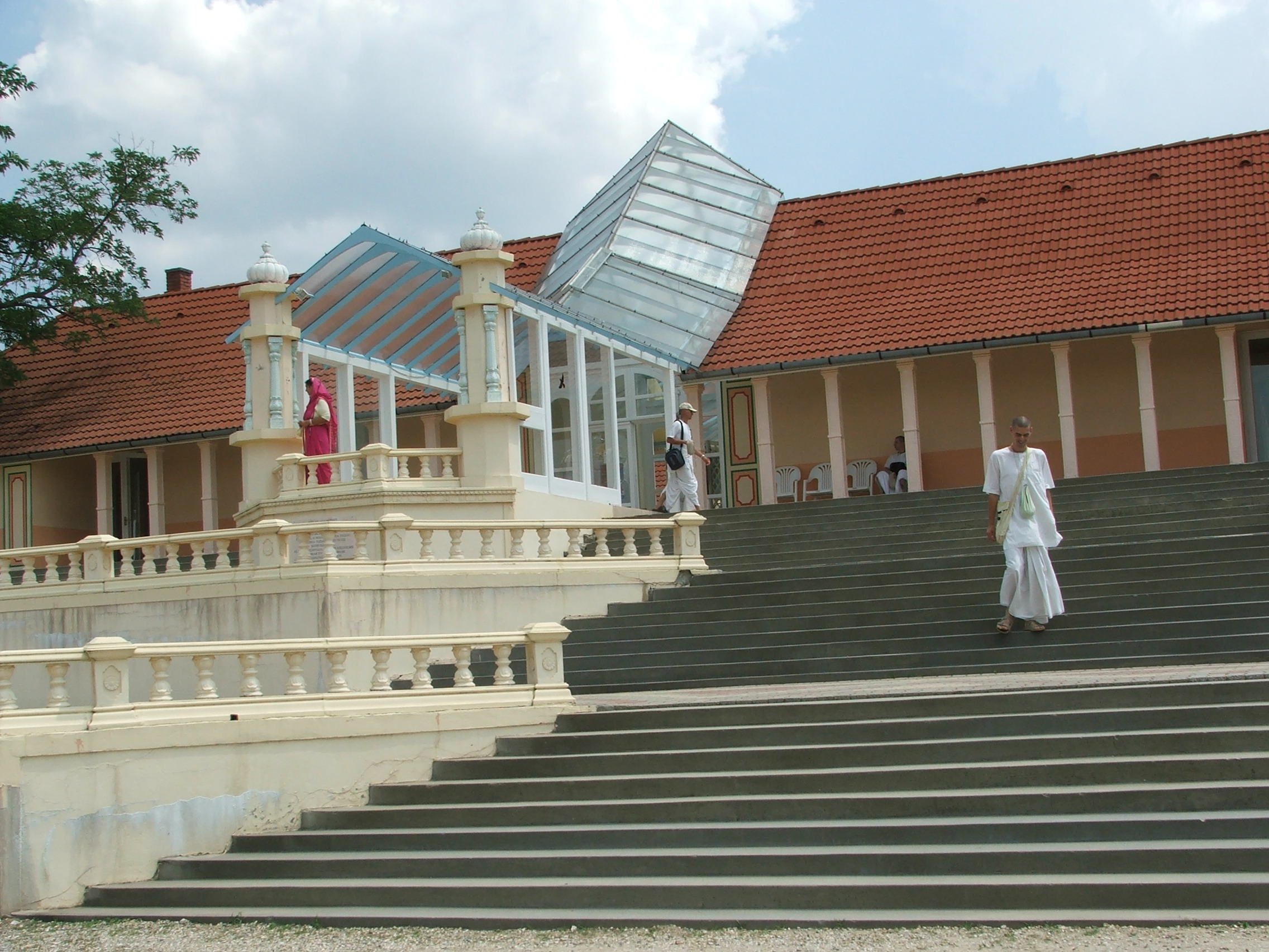 Somogyvámos, Krisna-völgy, templom